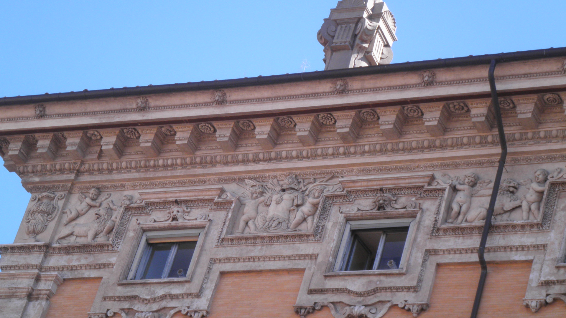 Roma, palazzo Madama. Particolare dell'ornamentazione del cornicione.